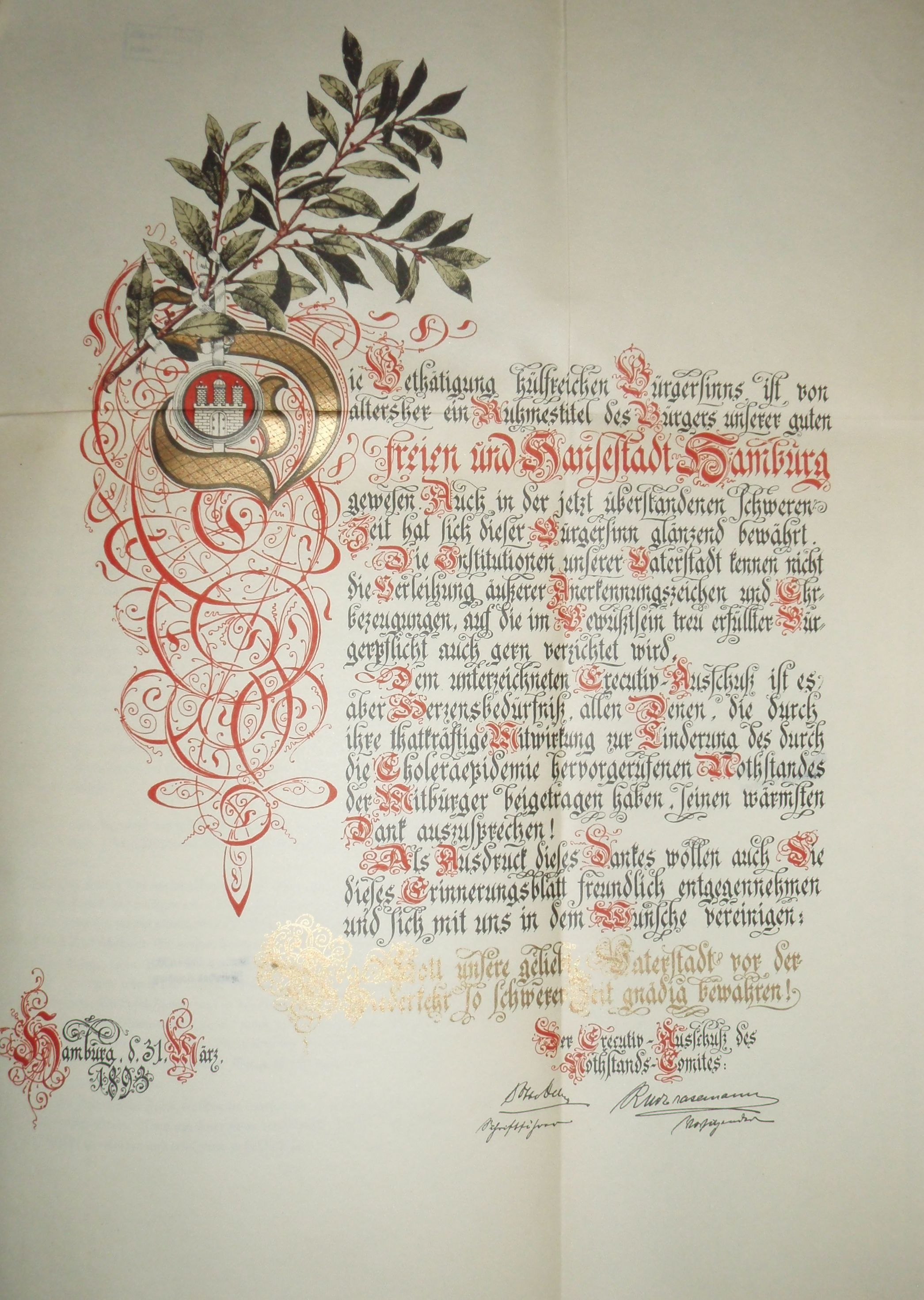 Die Bethätigung hülfreichen Bürgersinns ist von altersher ein Ruhmestitel des Bürgers unserer guten freien und Hansestadt Hamburg gewesen. Auch in der jetzt überstandenen schweren Zeit hat sich dieser Bürgersinn glänzend bewährt. Die Institutionen unserer Vaterstadt kennen nicht die Verleihung äußerer Anerkennungszeichen und Ehrbezeugungen, auf die im Bewußtsein treu erfüllter Bürgerpflicht auch gern verzichtet wird. Dem unterzeichneten Executiv-Ausschuß ist es aber Herzensbedürfnis, allen Denen, die durch ihre thatkräftige Mitwirkung zur Linderung des durch die Choleraepidemie hervorgerufenen Nothstandes der Mitbürger beigetragen haben, seinen wärmesten Dank auszusprechen! Als Ausdruck dieses Dankes wollen auch Sie dieses Erinnerungsblatt freundlich entgegennehmen und sich mit uns in dem Wunsche vereinigen: Soll unsere geliebte Vaterstadt vor der __________ so schweren Zeit gnädig bewahren! Hamburg, d. 31. März 1893 Der Executiv-Ausschuß des Nothstands-Comites